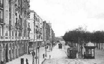 Acera de Recoletos de Valladolid a principios del siglo XX